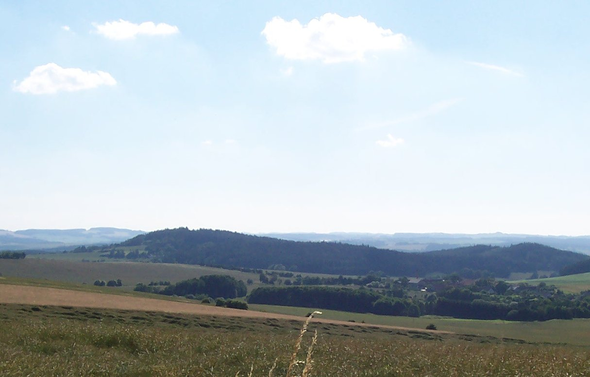 Husí Hora, Česká republika / Czech Republic